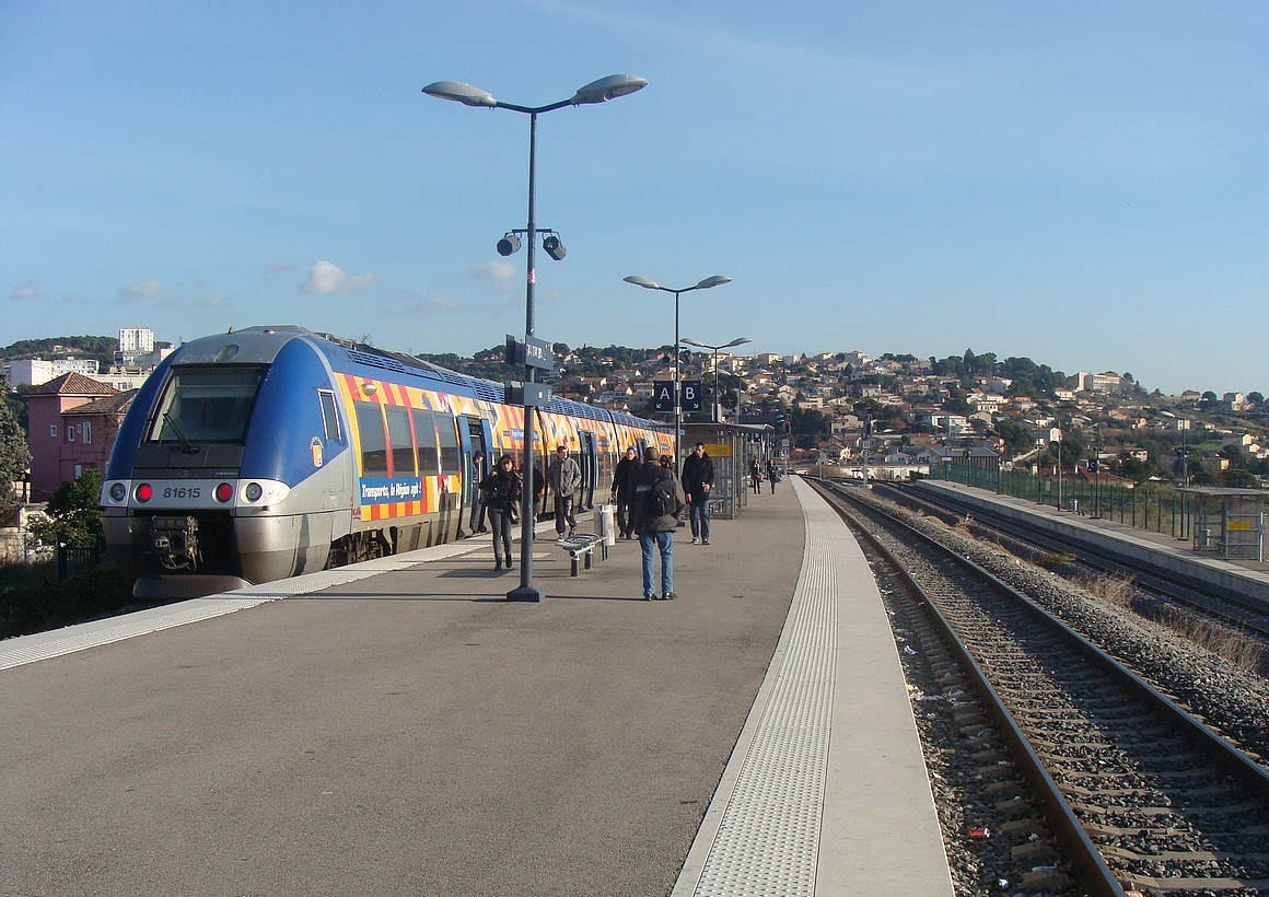 Le quai central de la gare. Une rame descendante est à l'arrêt sur la voie directe (voie A, à gauche). A droite, la voie de croisement (voie B) et la voie supplémentaire en tiroir (voie C, en contrebas).